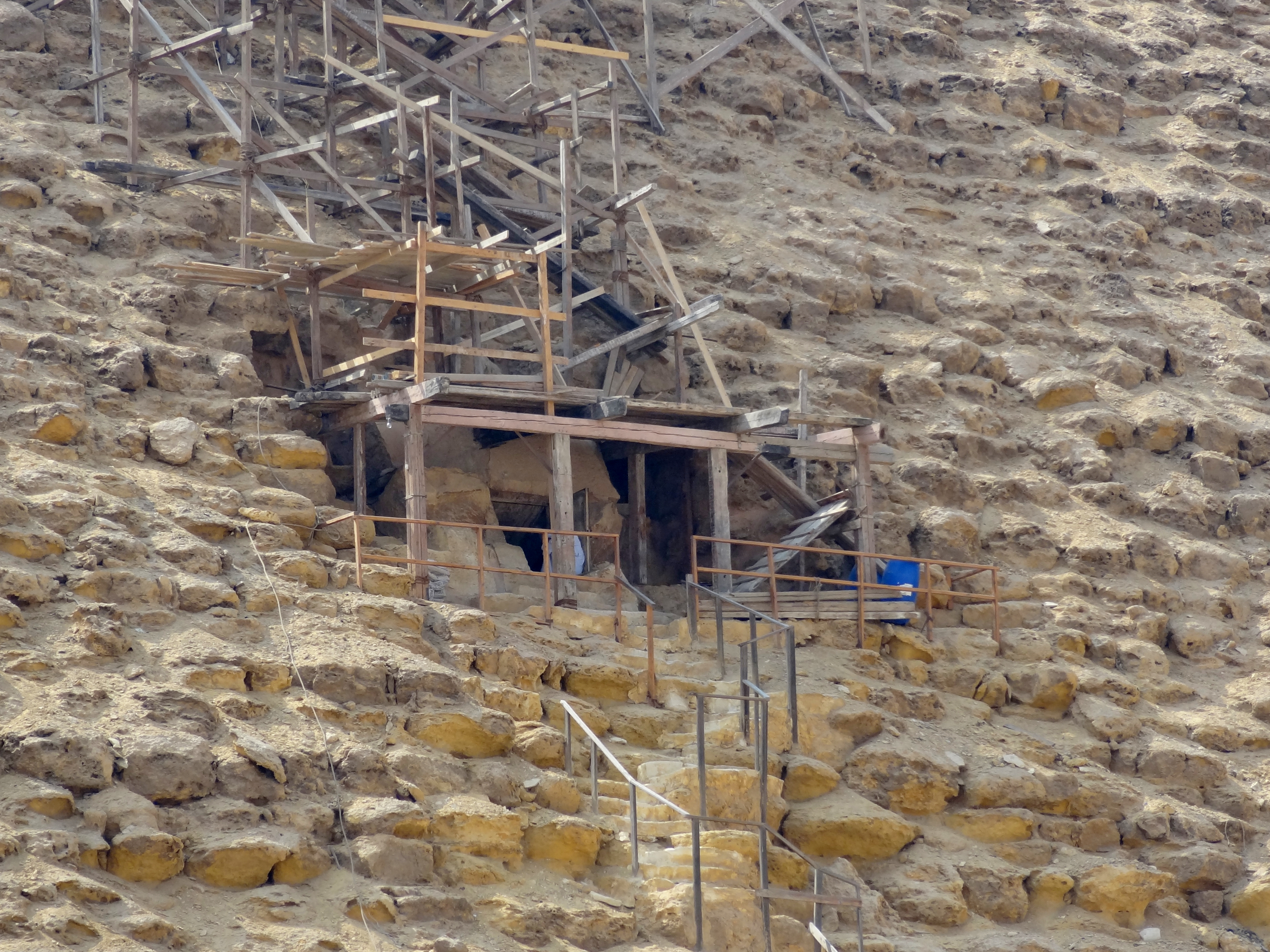 Rote Pyramide von Dahschur, Ägypten